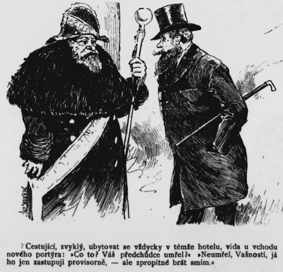 Humoristické listy 1899, vtip o spropitném